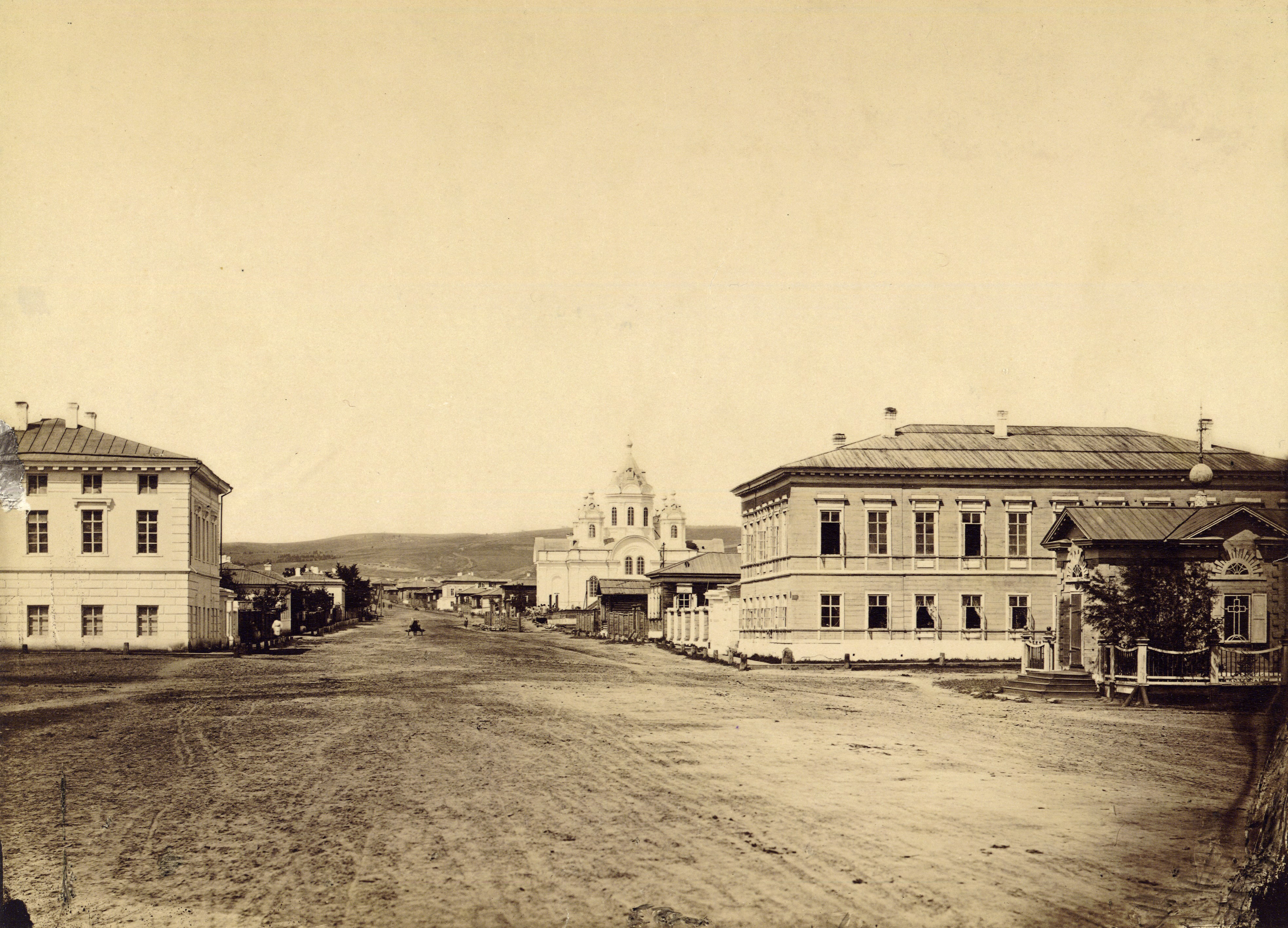 Город Троицкосавск (Кяхта). 1880-е.